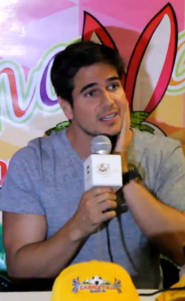 Rueda De Prensa Arleth Teran Y Daniel Arenas Para - Como Tu Lo Querias Ver